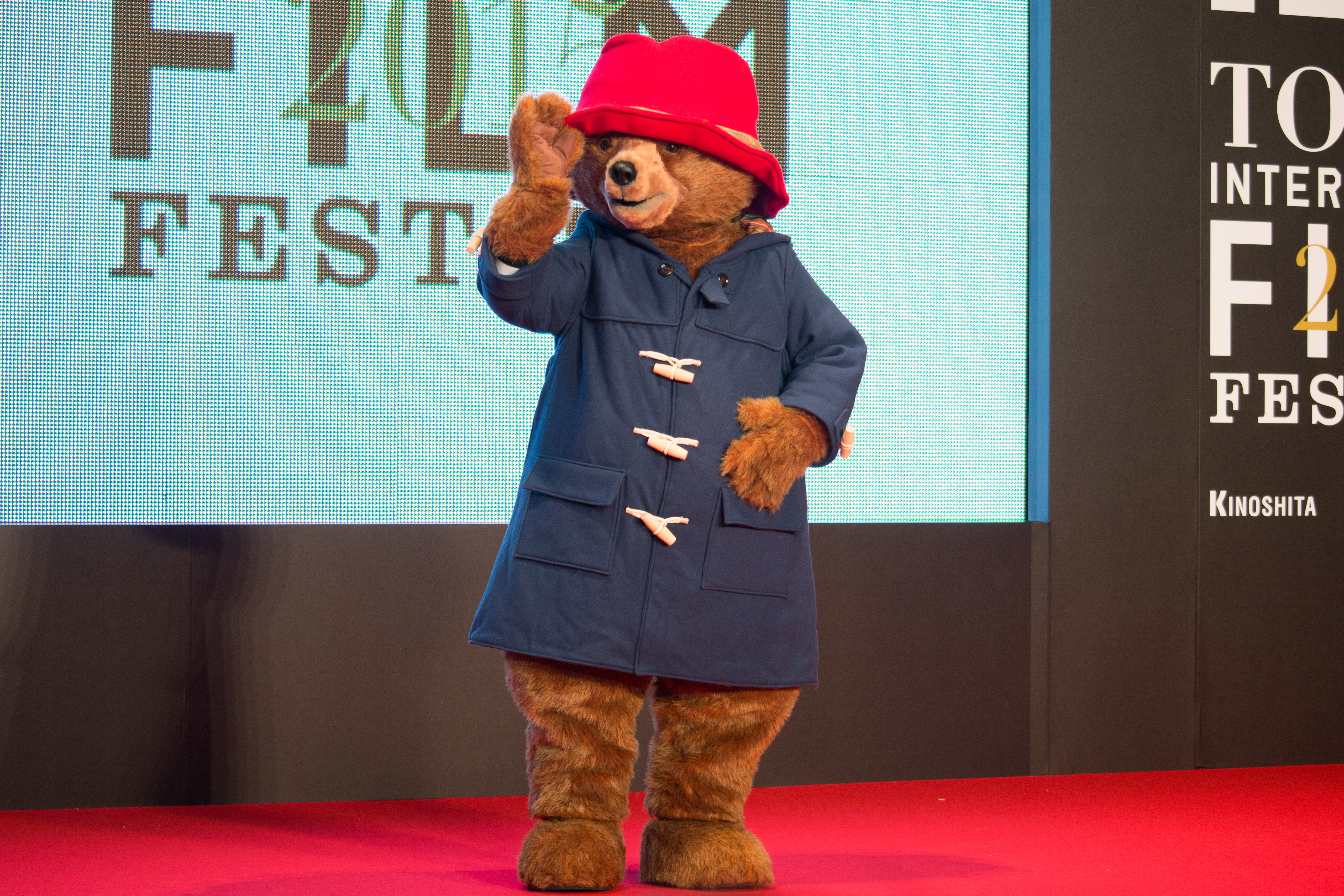 第28回 東京国際映画祭 オープニングセレモニー パディントン (パディントン)